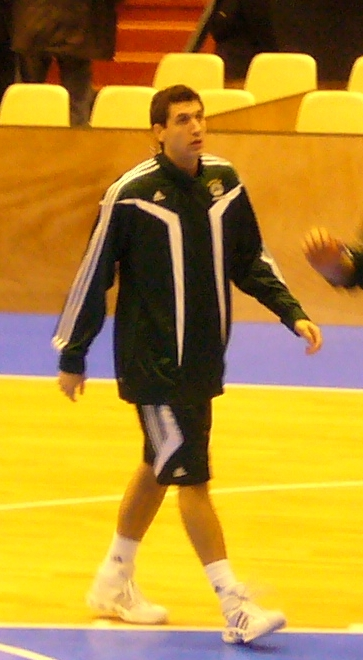 Le joueur grec Dimitris Diamantidis sous le maillot du Panathinaikos en novembre 2007 (Clermont-Ferrand)